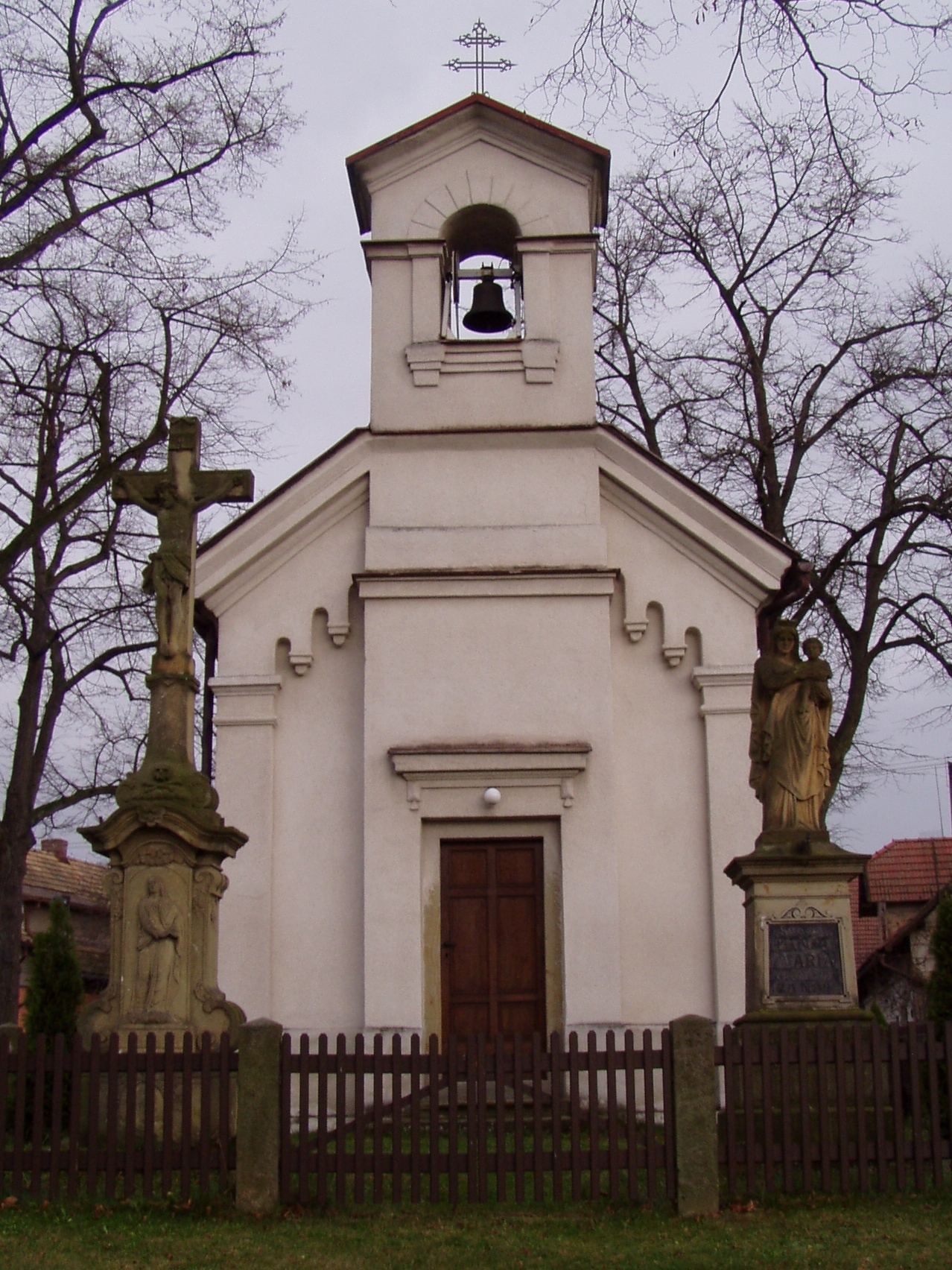 Kaple sv. Václava (Hroška)